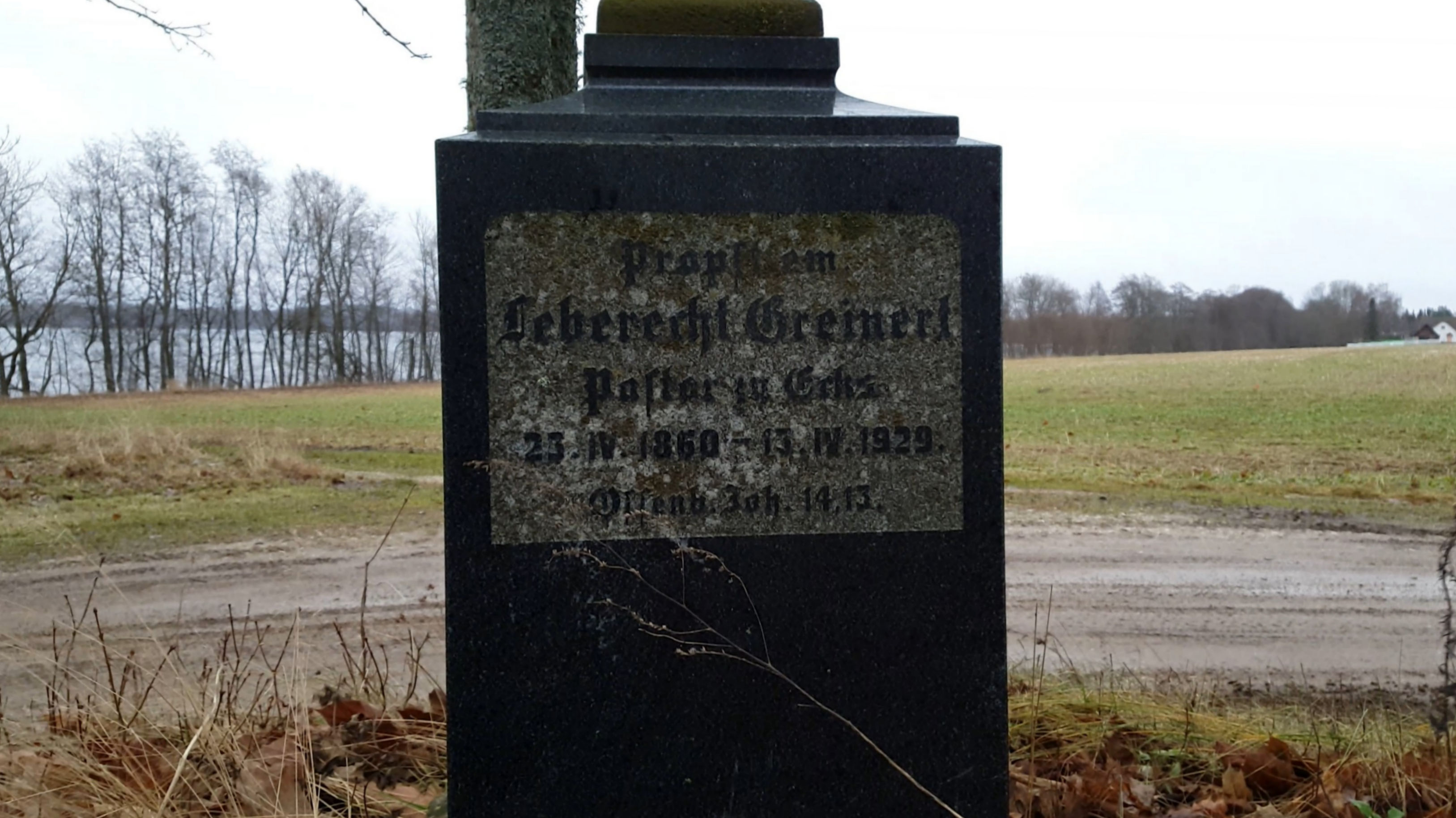 Äksi pastori Leberecht Greinerti (1860-1929) hauakivi Äksi kalmistul.